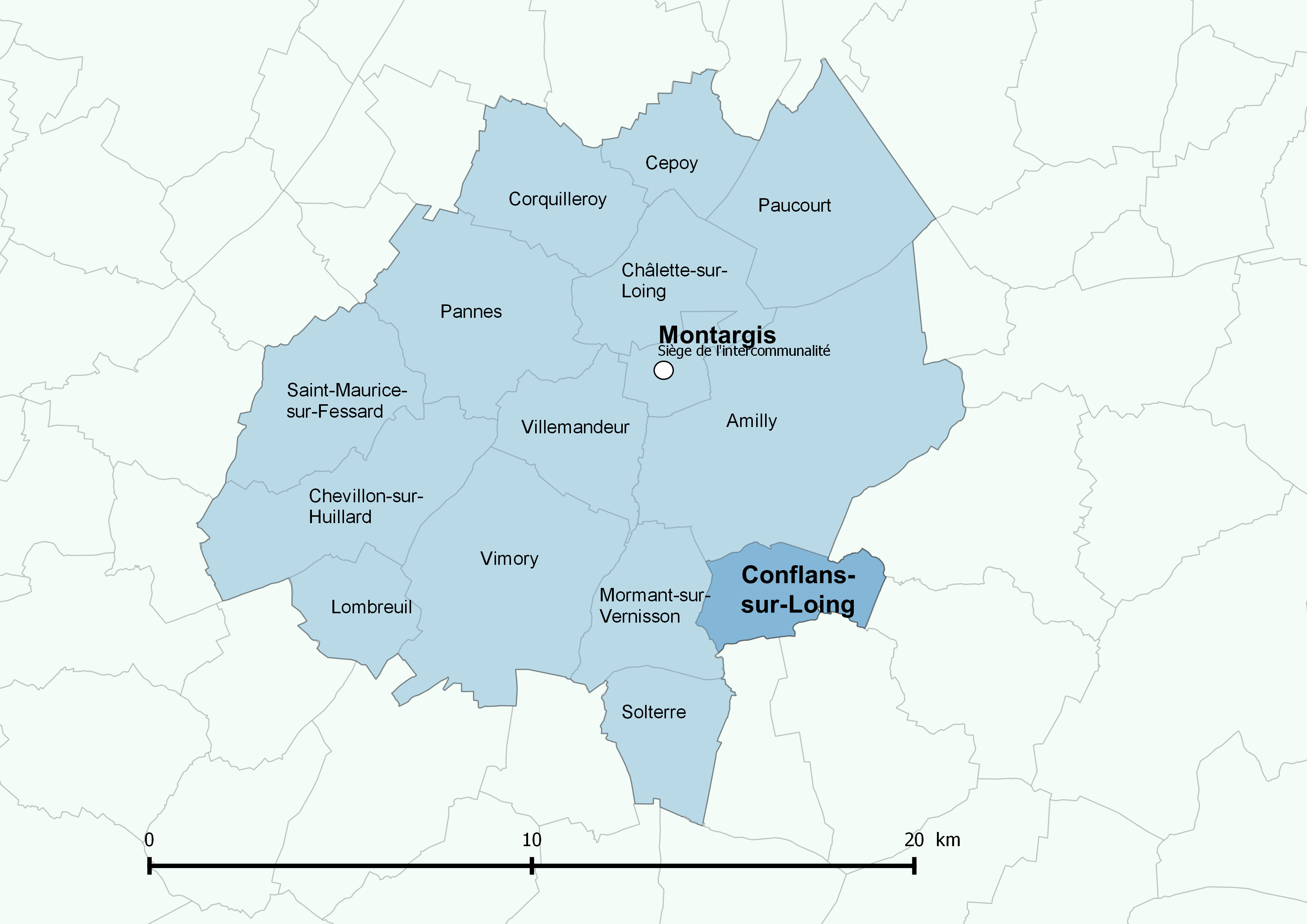 Périmètre de l'Agglomération montargoise et rives du Loing - Positionnement de la commune de Conflans-sur-Loing